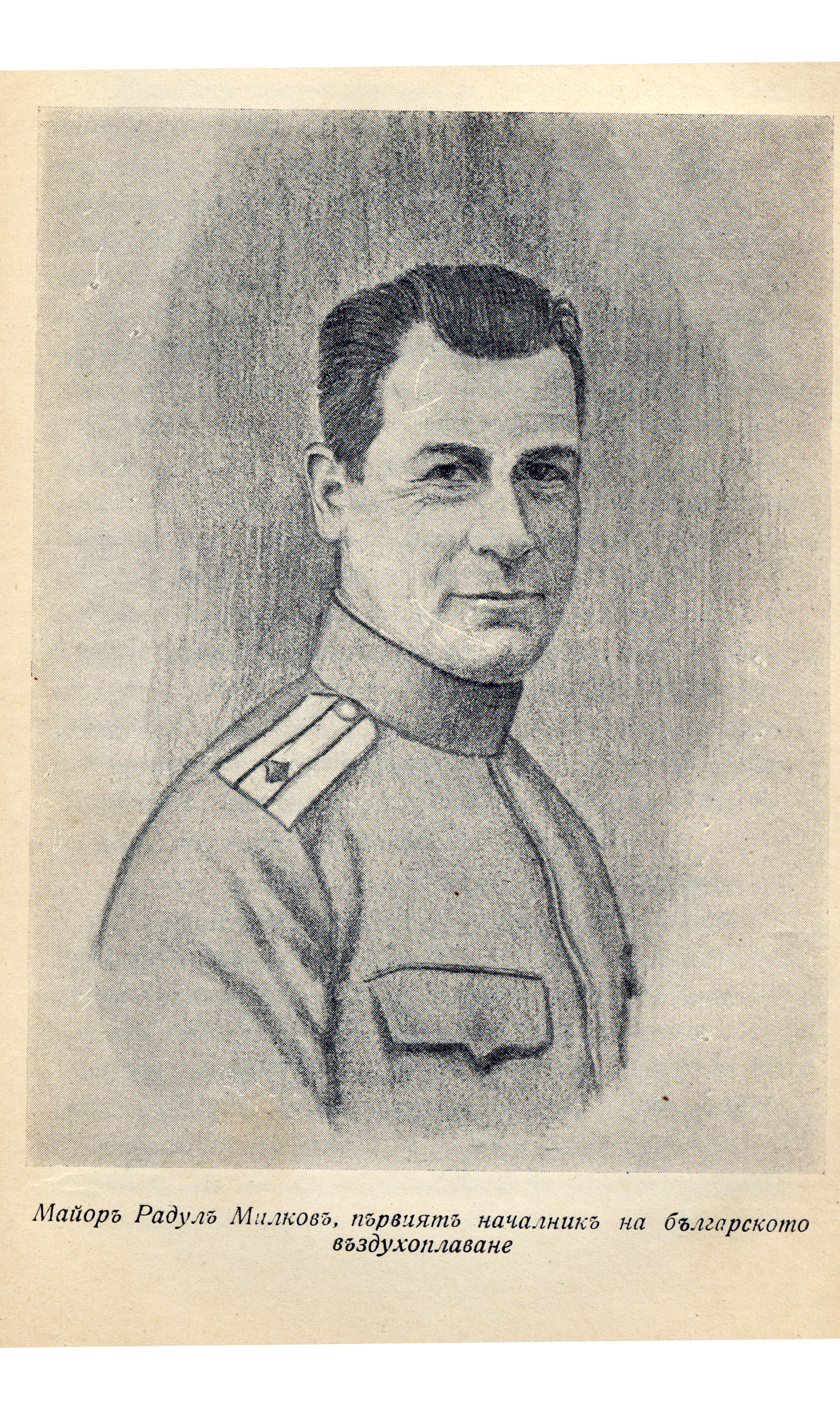 Радул Милков, военен пилот, полковник от ВВС на България. Скицата вероятно е рисувана 1917-1918 година. Авторът е неизвестен.